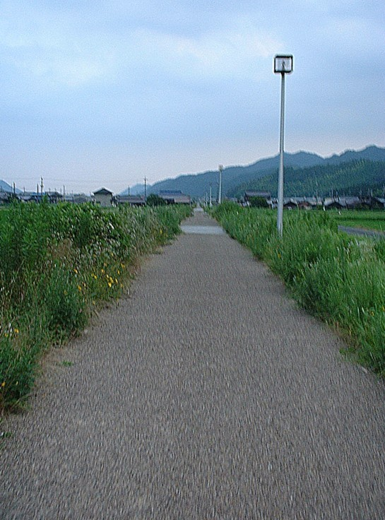 鍛冶屋線廃線敷を活用したサイクリングロード 街灯も整備され、夜も安全に利用できる 兵庫県西脇市